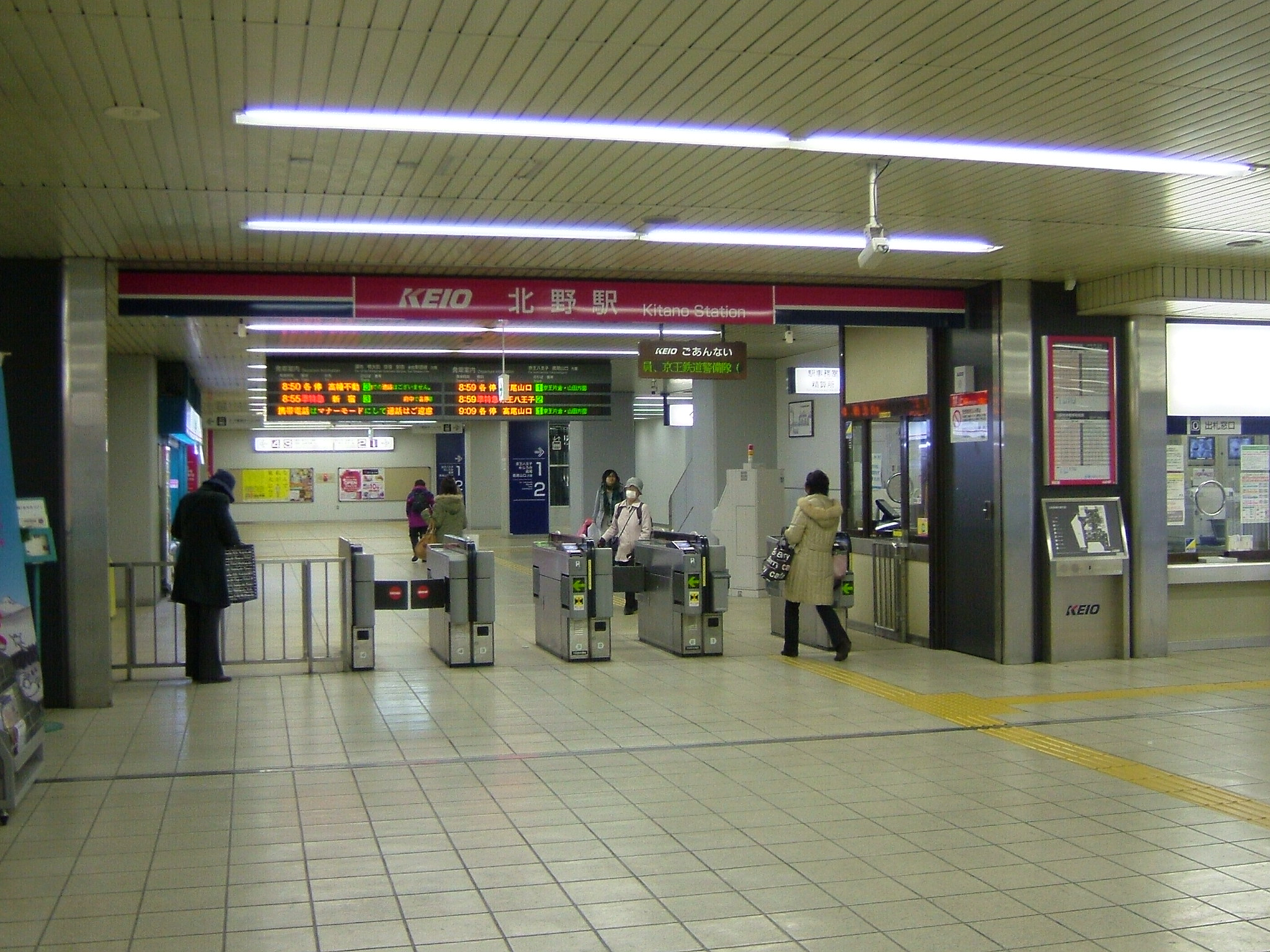 京王電鉄北野駅改札口